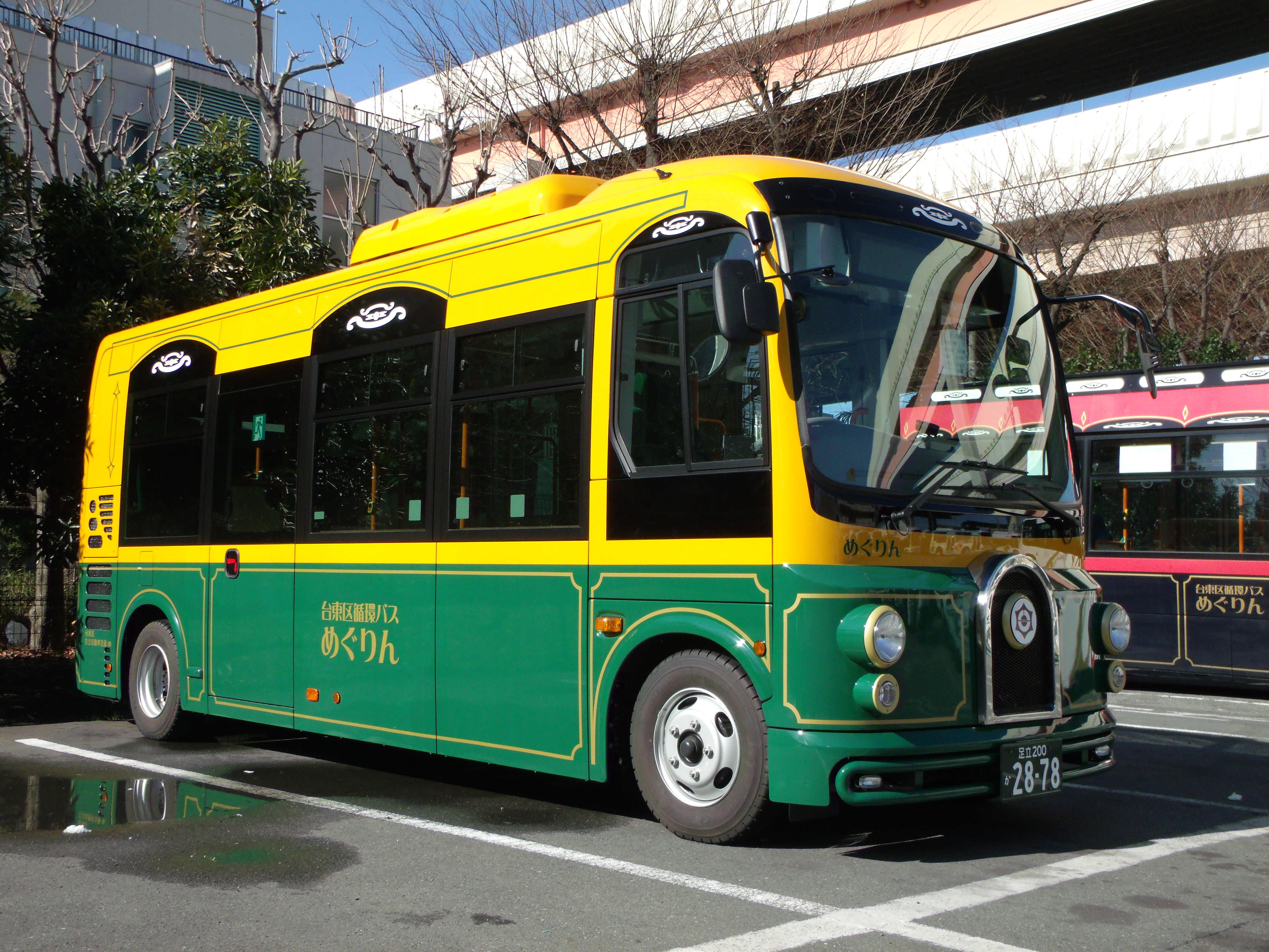 南めぐりん専用車。2014年に導入された。